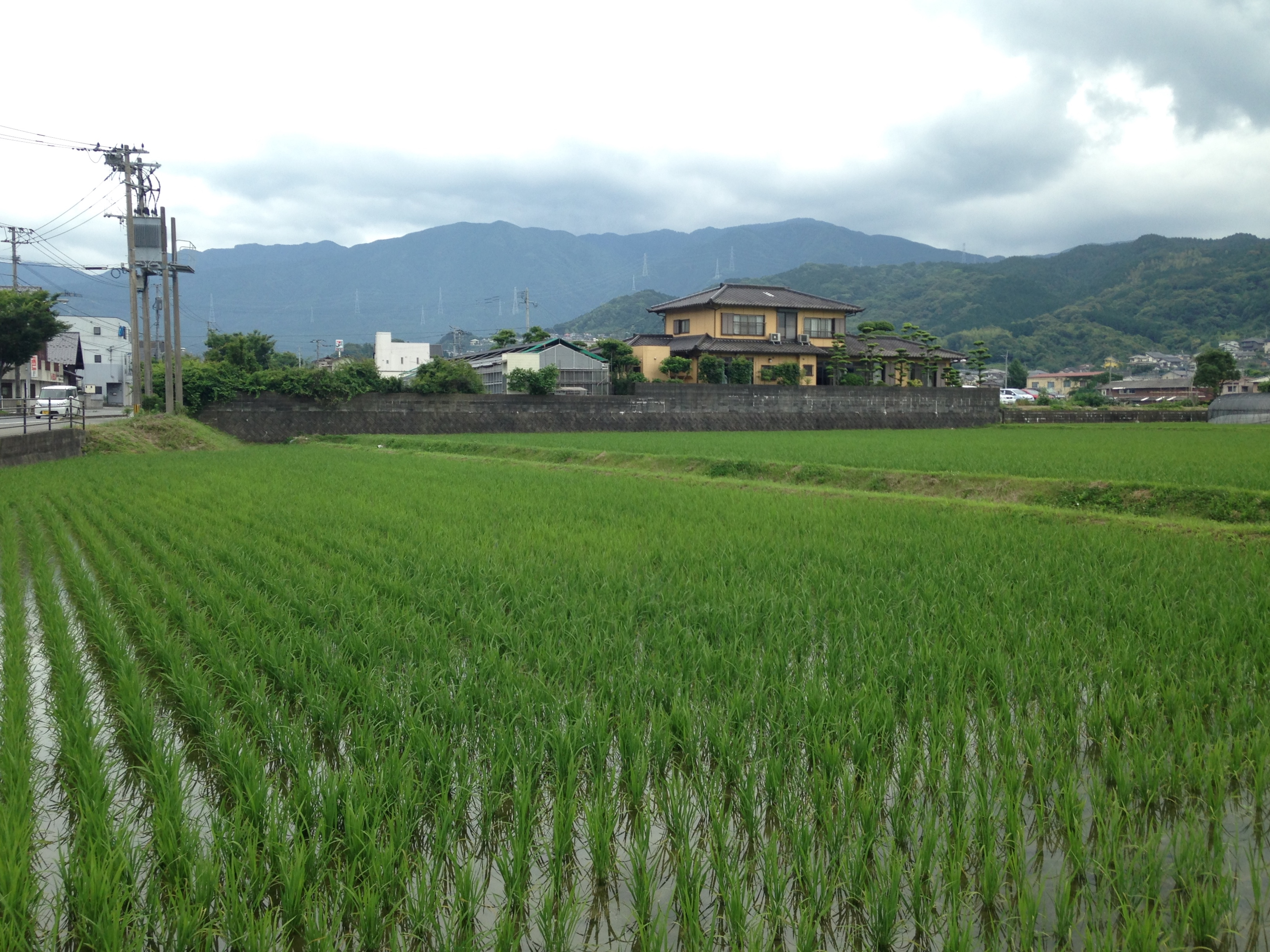 福岡市早良区早良2丁目の田んぼ